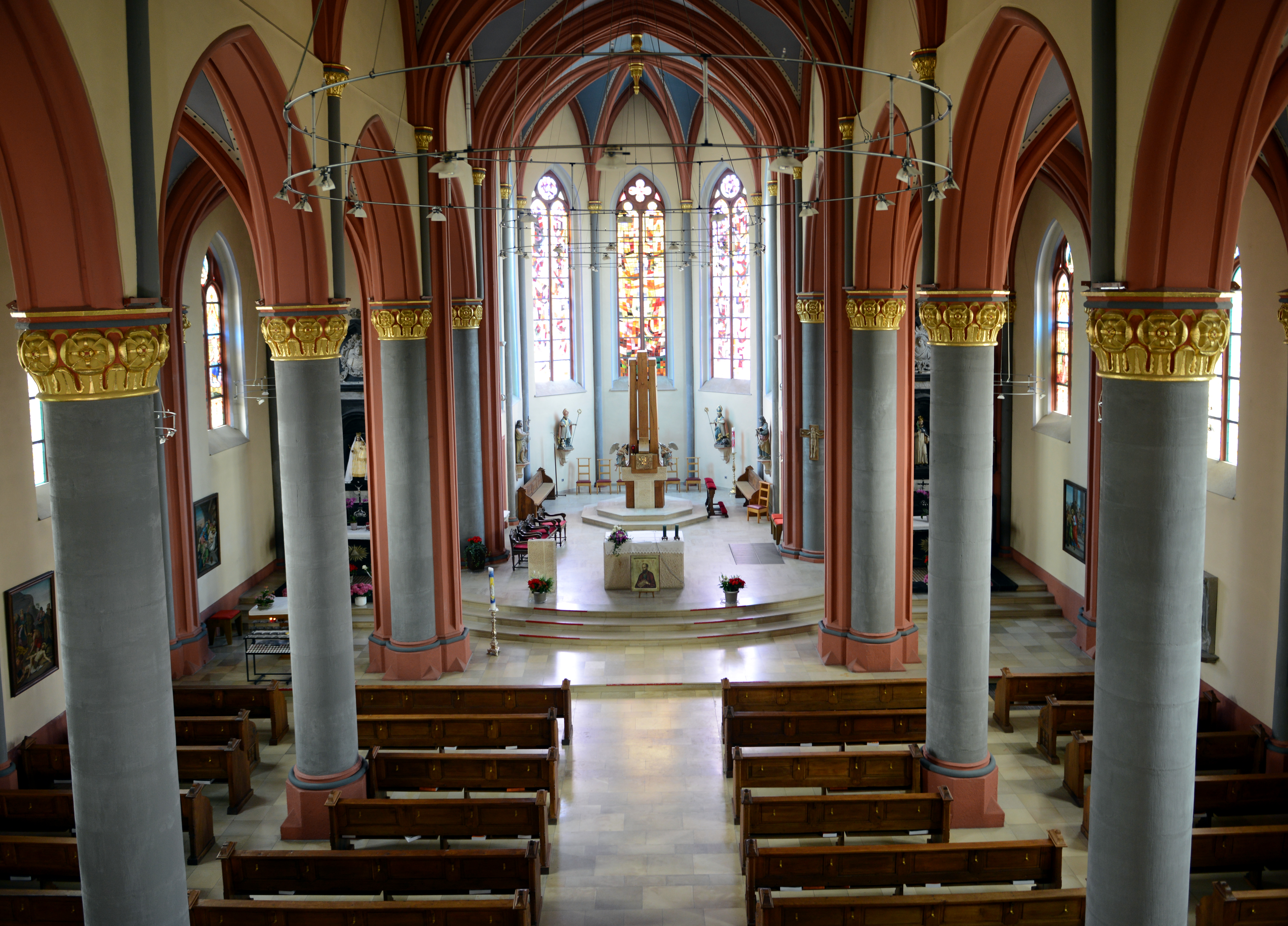 Vum Duxall gesinn: Den Interieur vun der Steeseler Kierch.